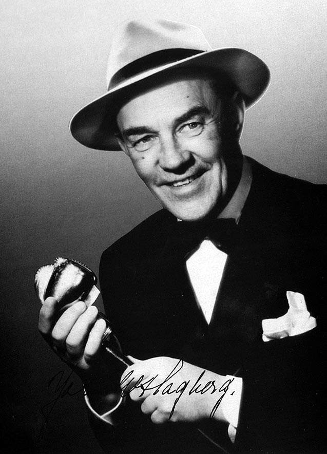 John Wilhelm Hagberg